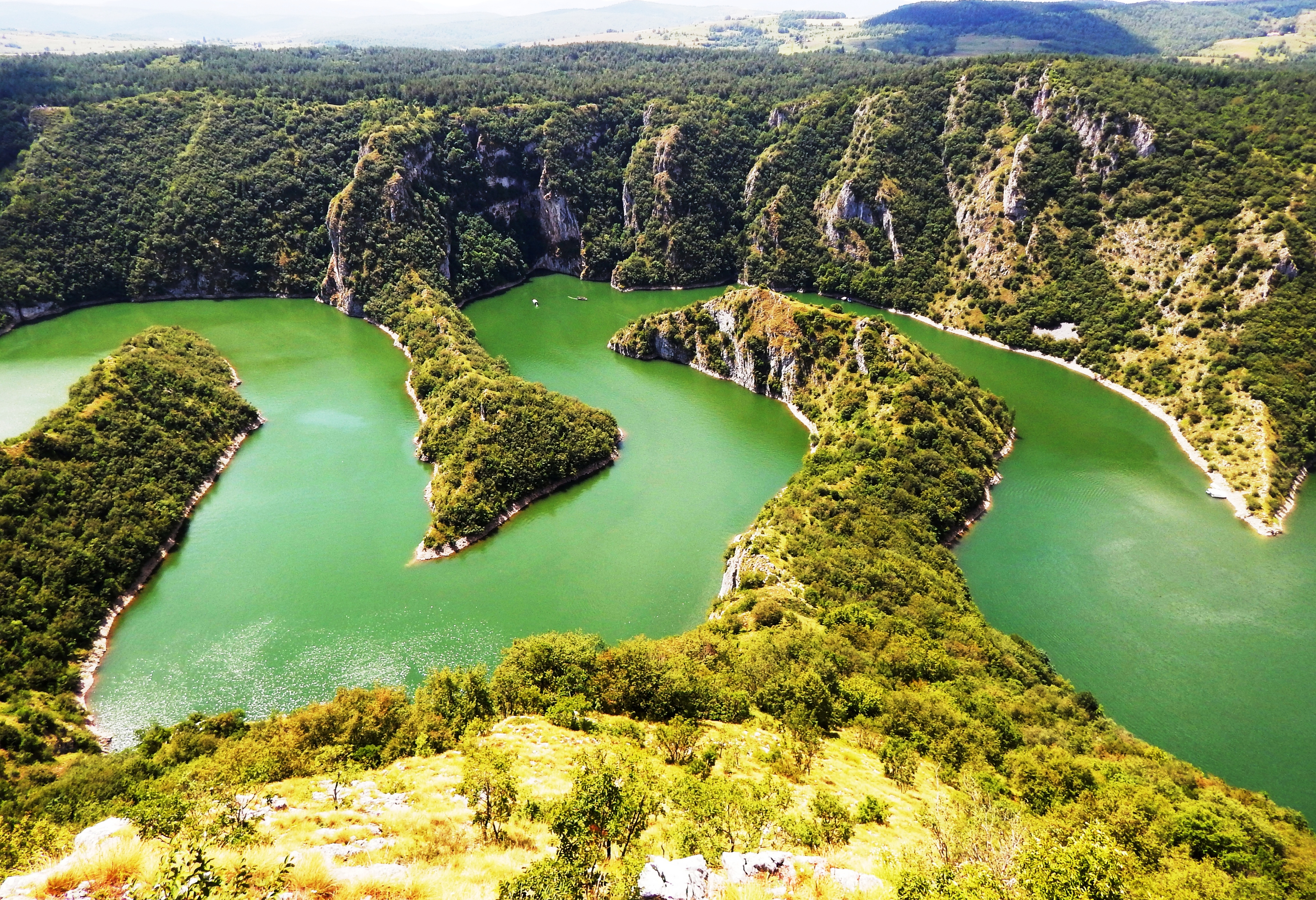 Meandri Uvca, Uvačko jezero, Sjenica. Ово је фотографија заштићеног природног добра у Србији под шифром: РП43This is a a photo of a natural area in Serbia with ID: РП43